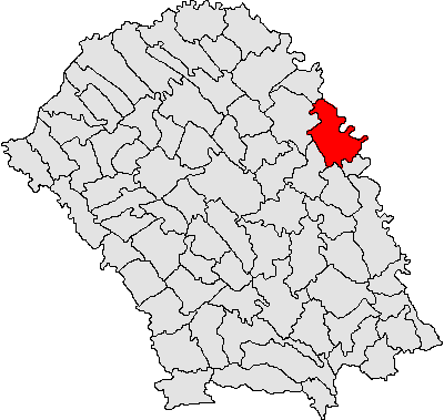 Categorie:Hărţi ale judeţului Botoşani